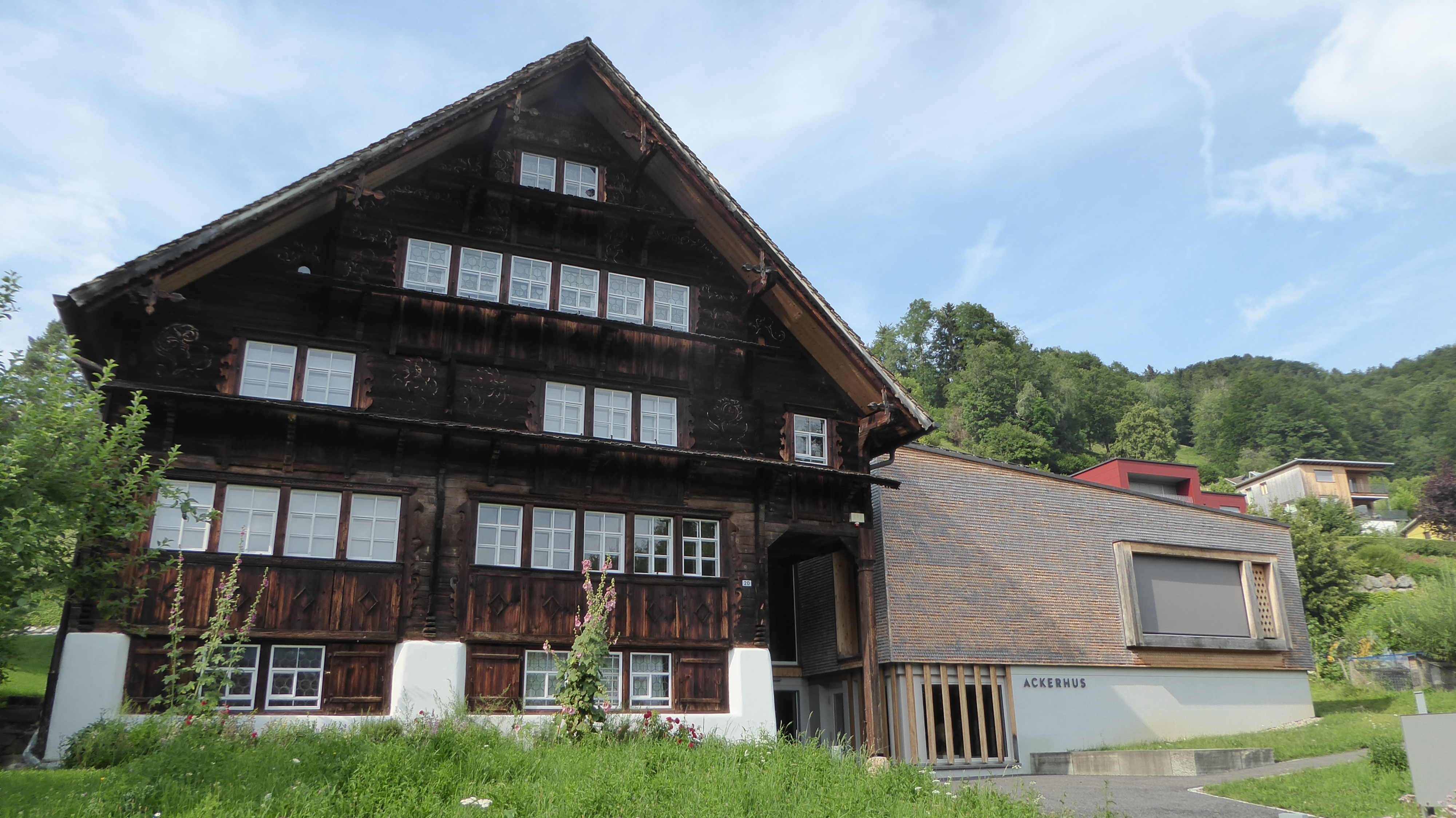 Ackerhaus mit Anbau aus dem Jahr 2015